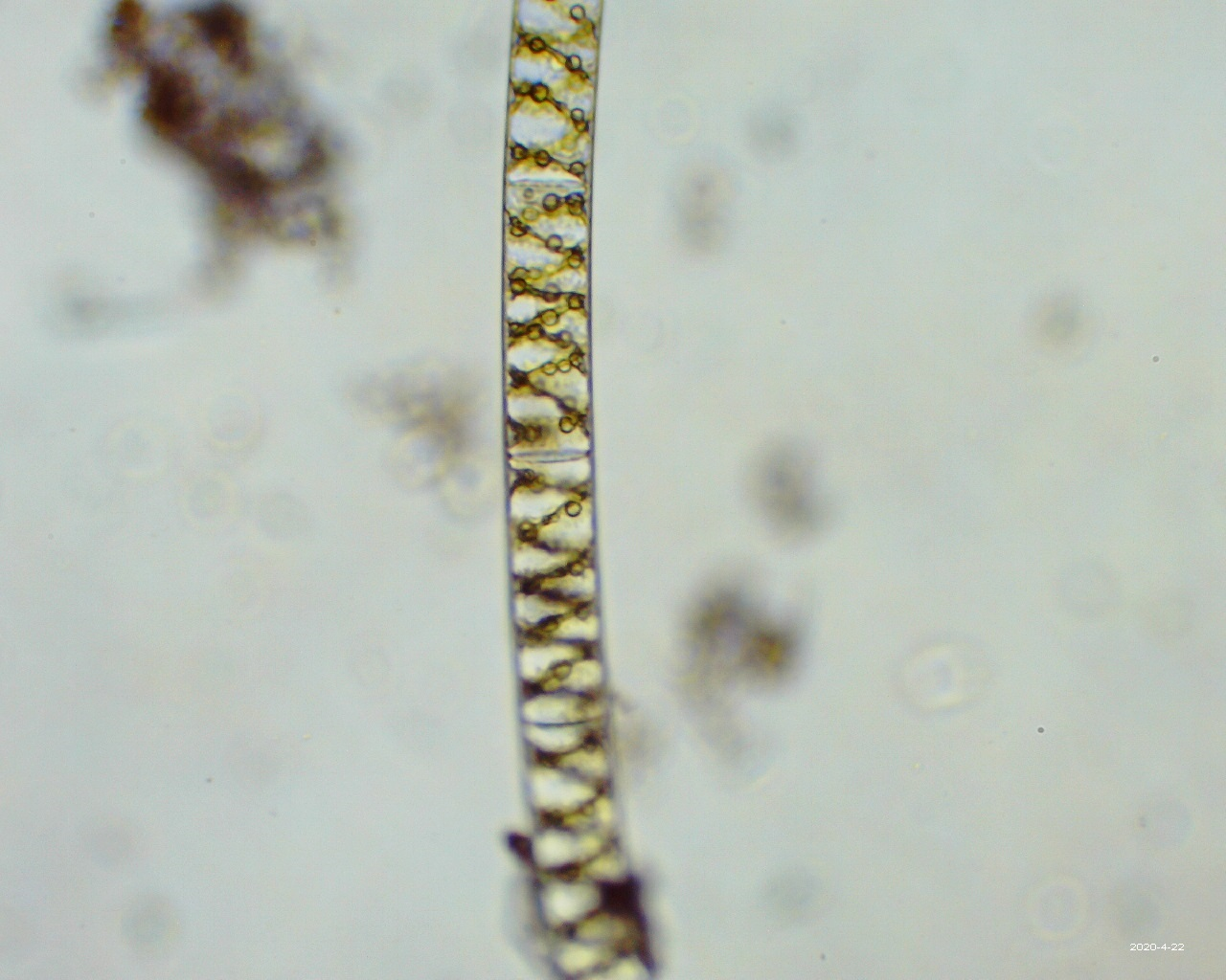 Spirogryra sp. im Hellfeld